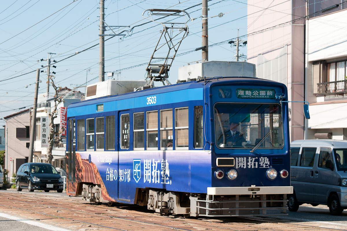 豊橋鉄道東田本線3503、前畑－東田坂上。